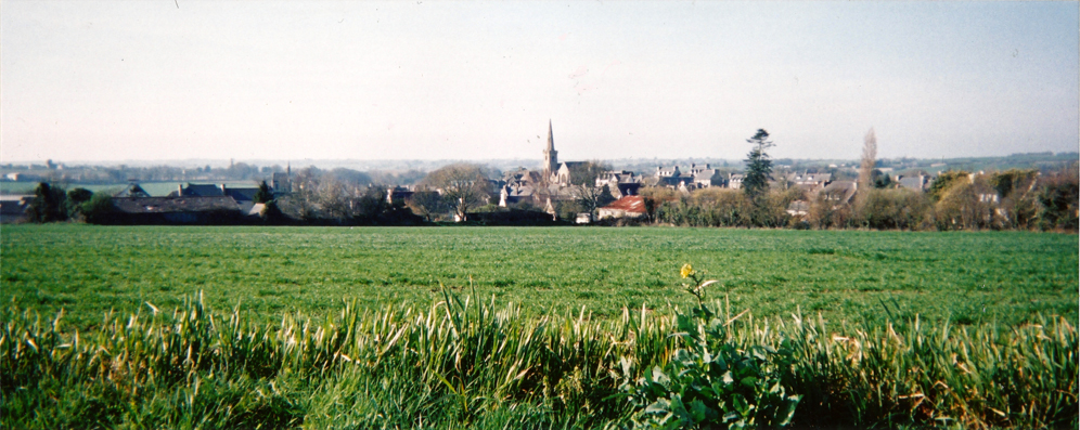 Ar Roc'h-Derrien. Gwel-meur. 2003